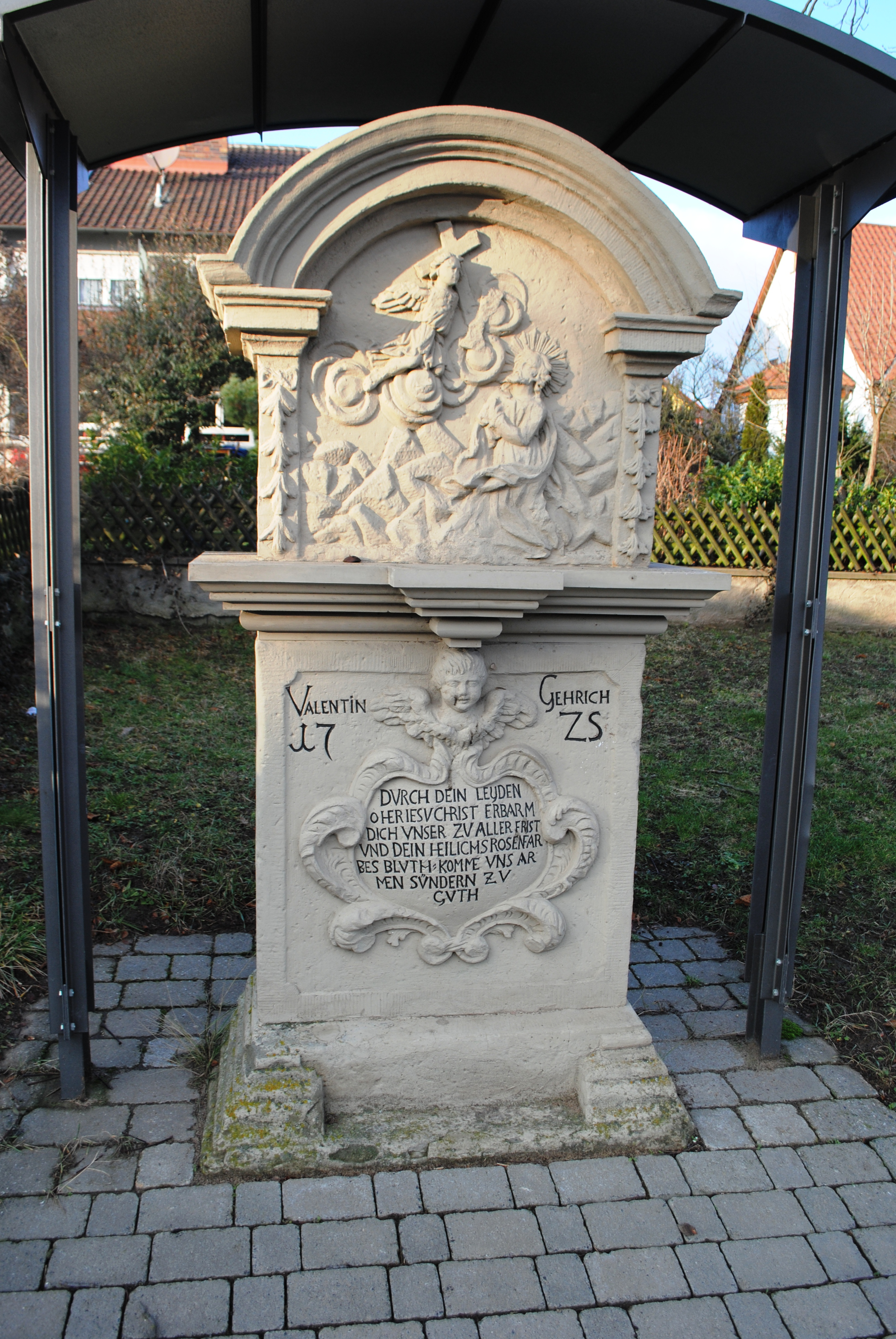 Bildstock, KT 57, Sommerach, mit Ölbergszene und Kreuzigung, bez. 1725; D-6-75-169-63